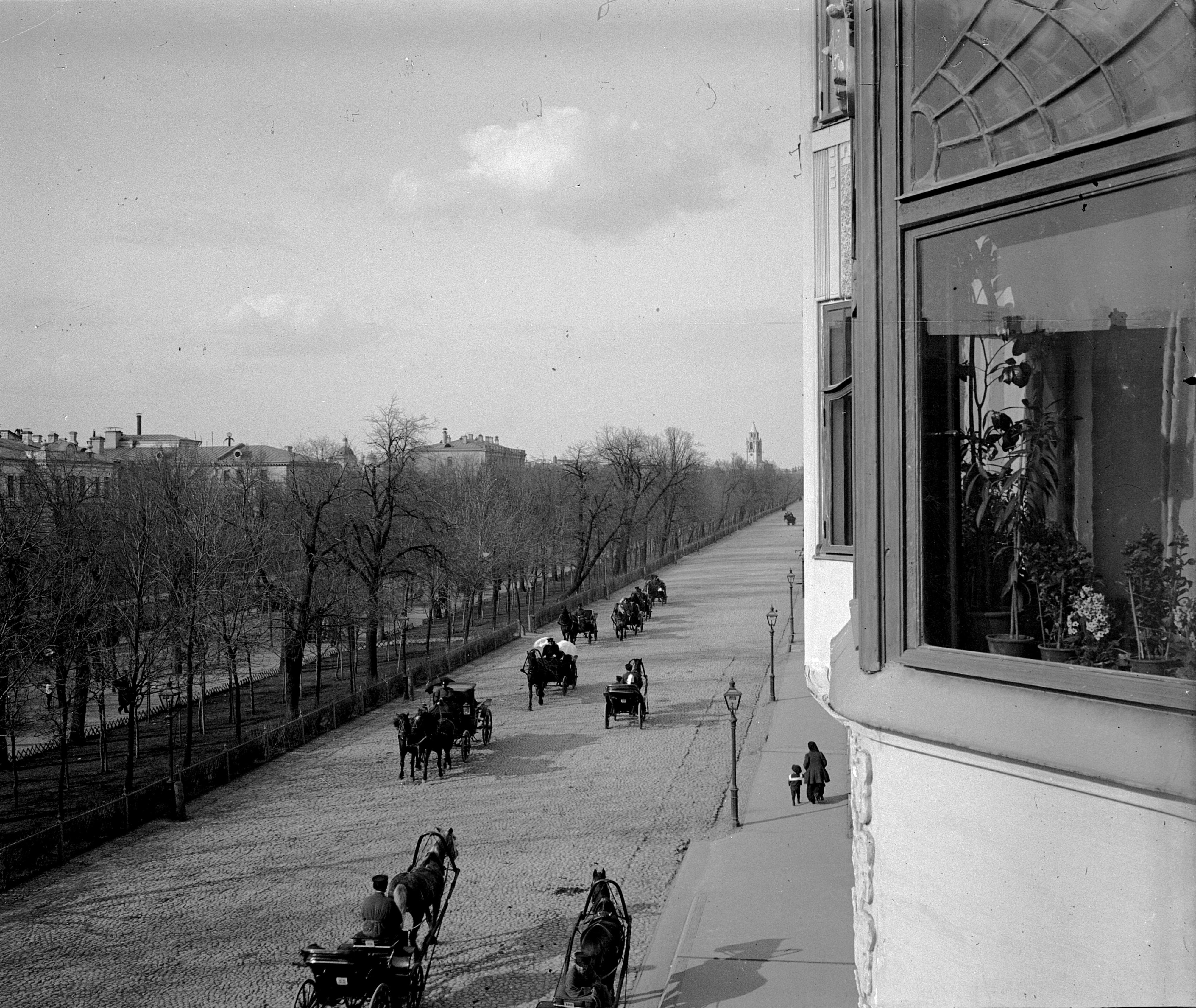 Москва, Тверской бульвар